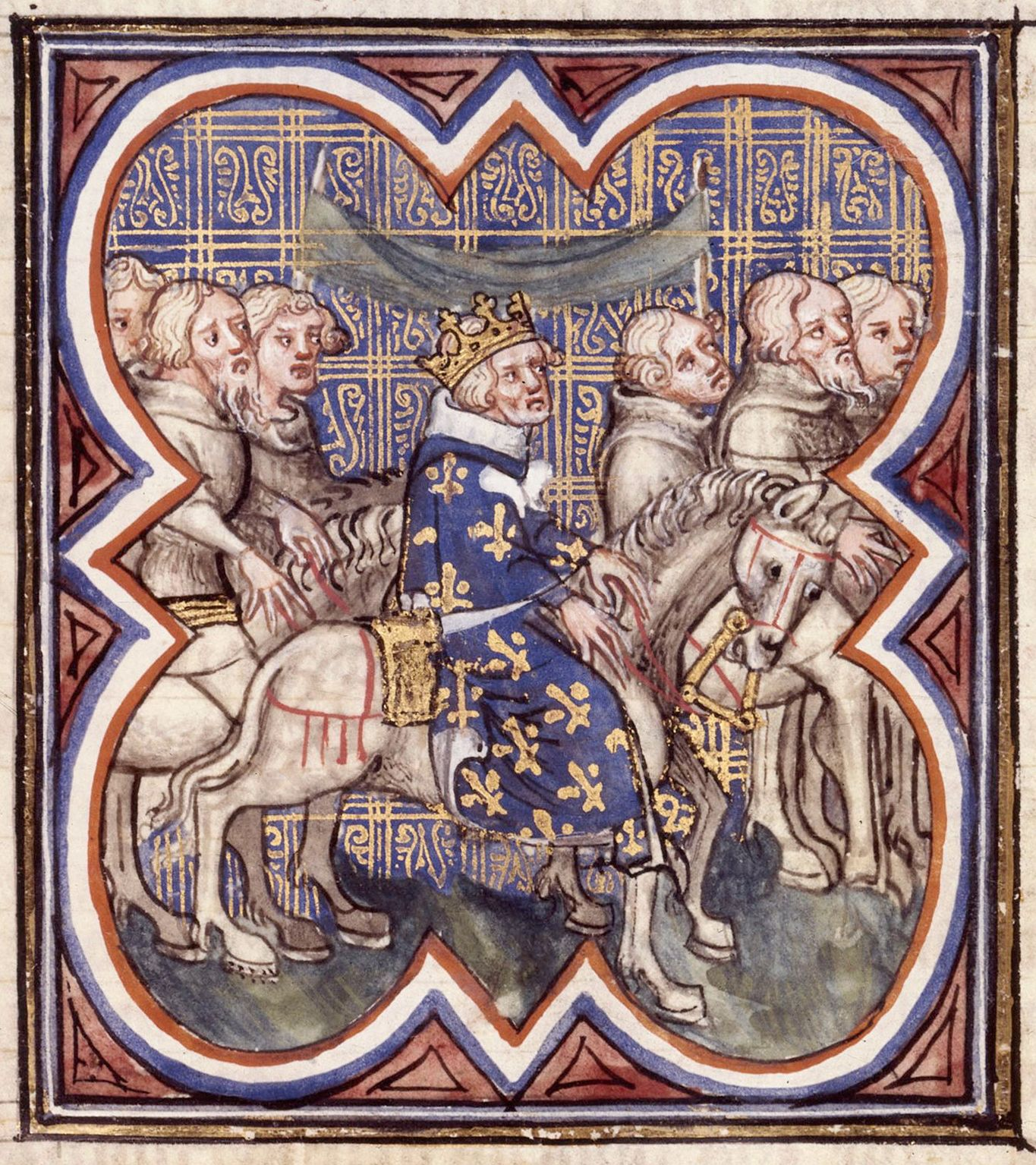 Jean le Bon rentre de captivité, entouré de ses conseillers. Enluminure des Grandes Chroniques de France, XIVe siècle. Paris, BnF, département des Manuscrits, Français 2813, fol. 436 verso. [1]